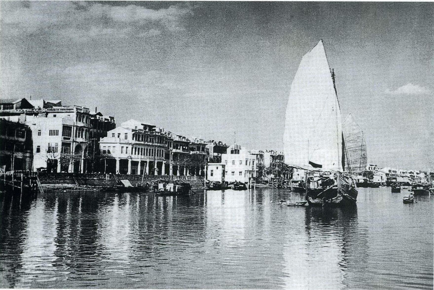 1950年代的江门长堤